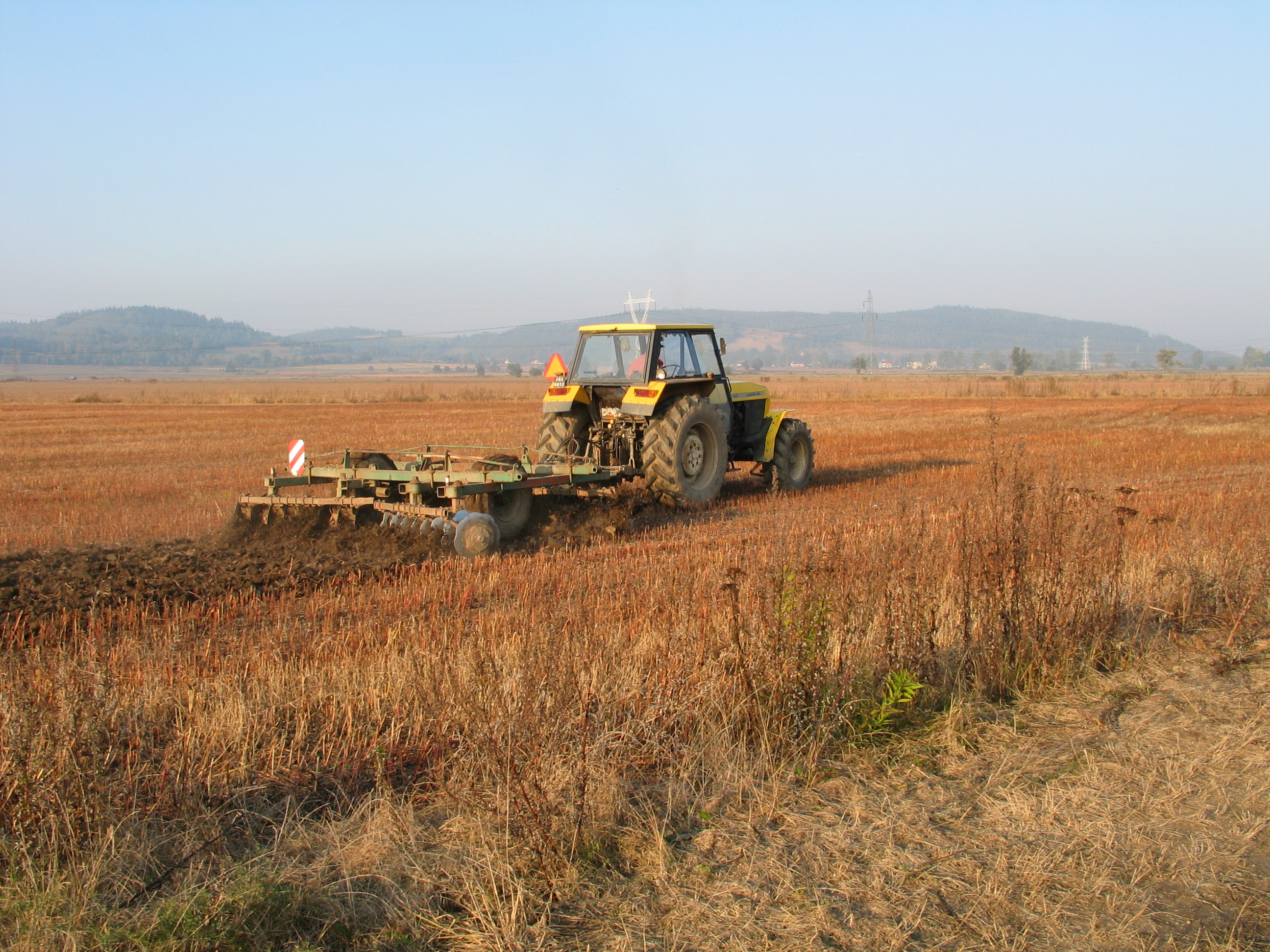 Ciągnik rolniczy Ursus 914 podczas prac polowych – Prace polowe. Talerzowanie ścierniska po uprawie gryki (Fagopyrum esculentum).